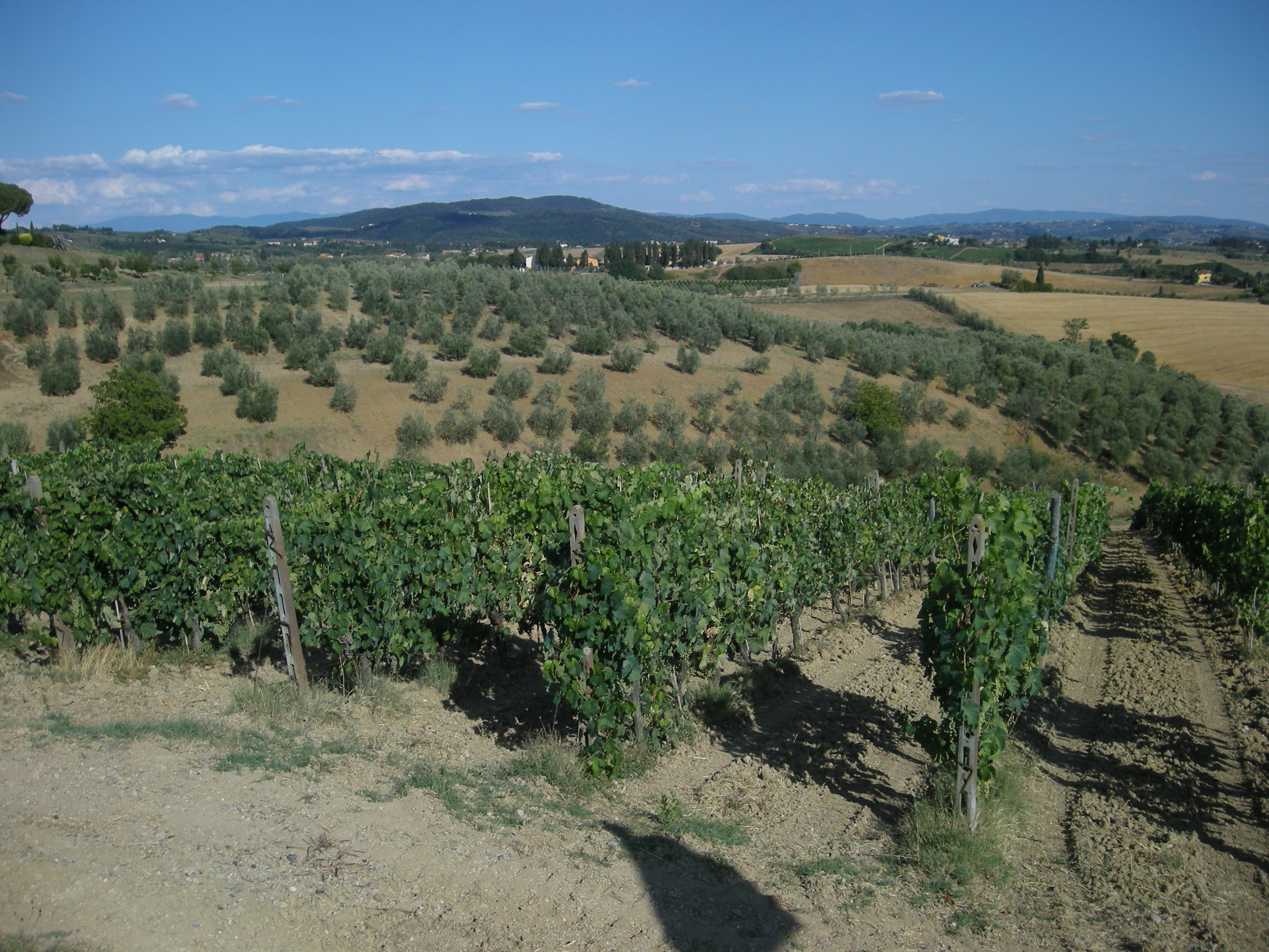 Campagna a Malmantile (Lastra a Signa - FI)